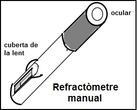 Esquema de un refractòmetre manual